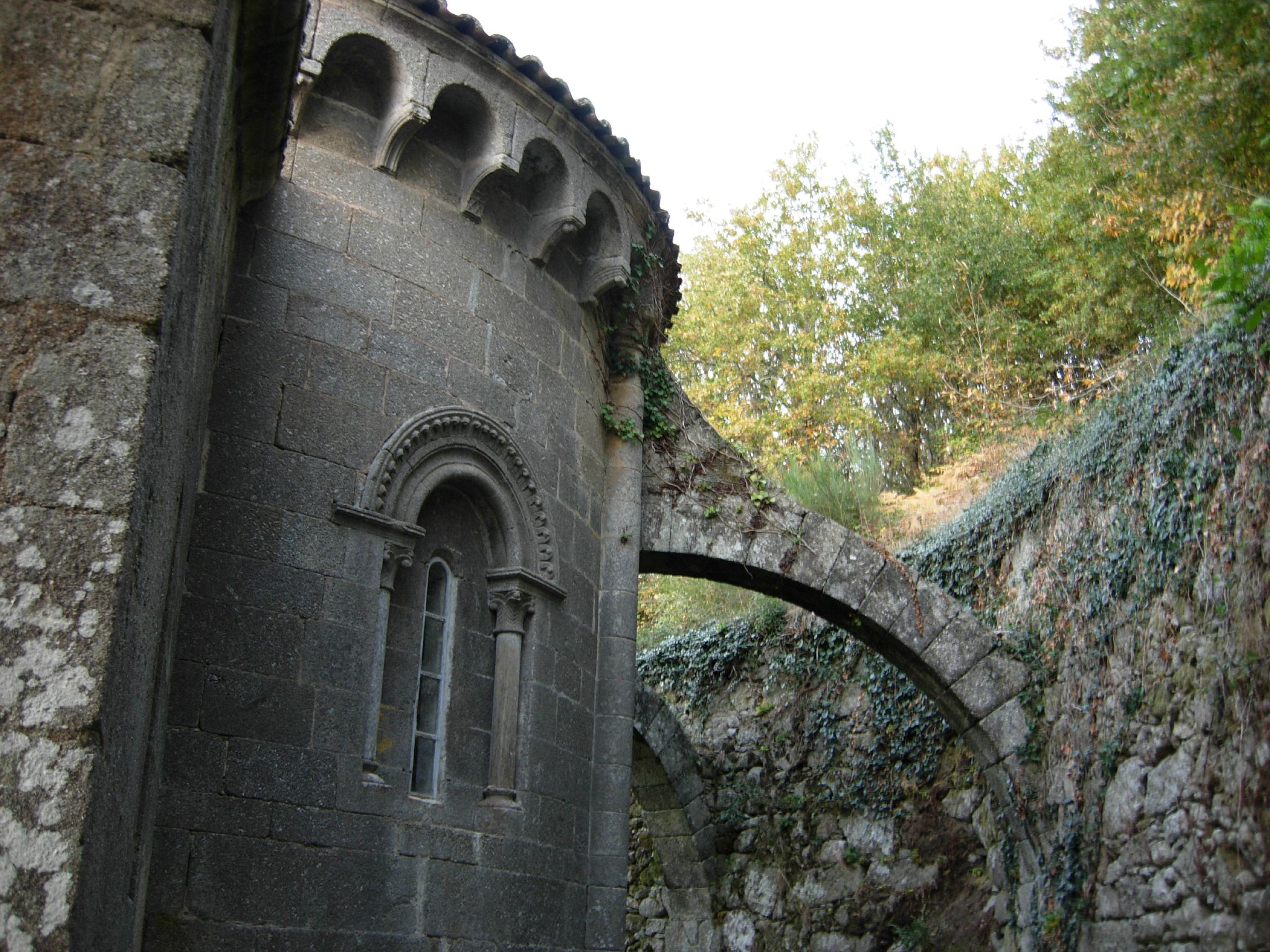 Igrexa de Santo Estevo de Ribas de Miño, O Saviñao, Galiza